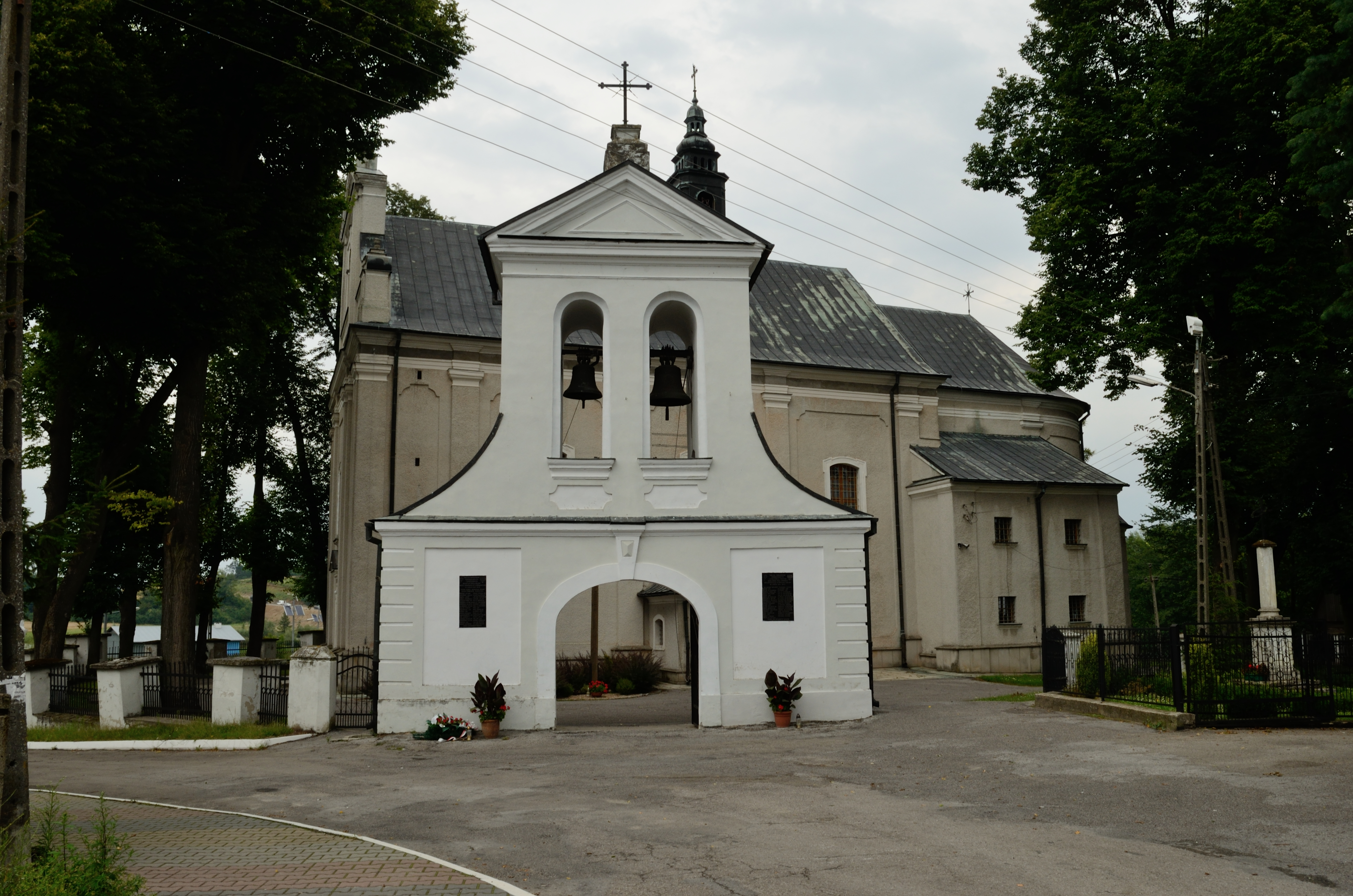 Zvonice před kostelem sv. Bartoloměje v obci Goraj, Polsk